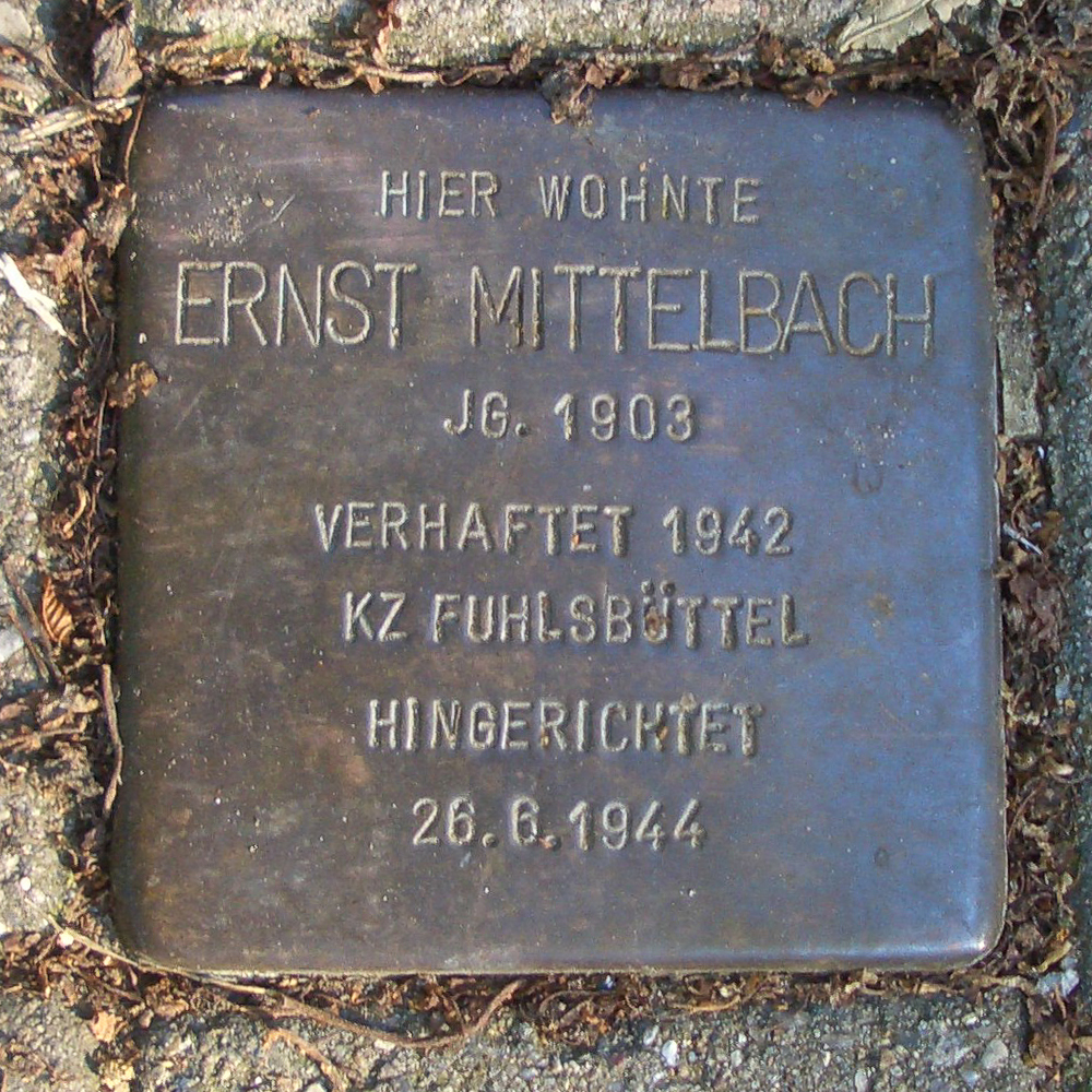 Stolperstein für Ernst Mittelbach vor dem Gebäude Wellingsbütteler Landstraße 186 in Hamburg-Ohlsdorf.